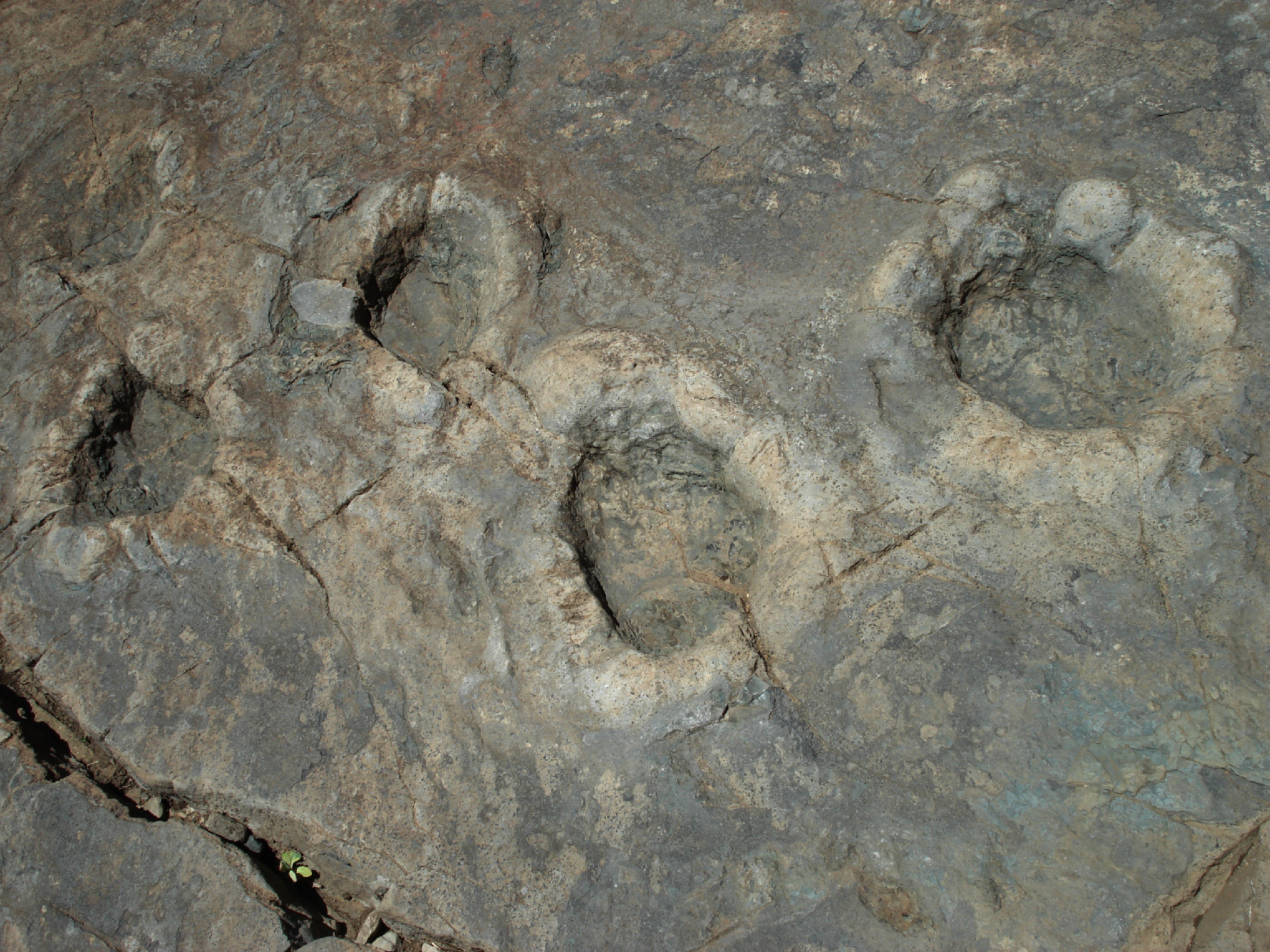 Huellas de animales extinguidos en las Termas del Flaco This is a photo of a national monument in Chile: 1385